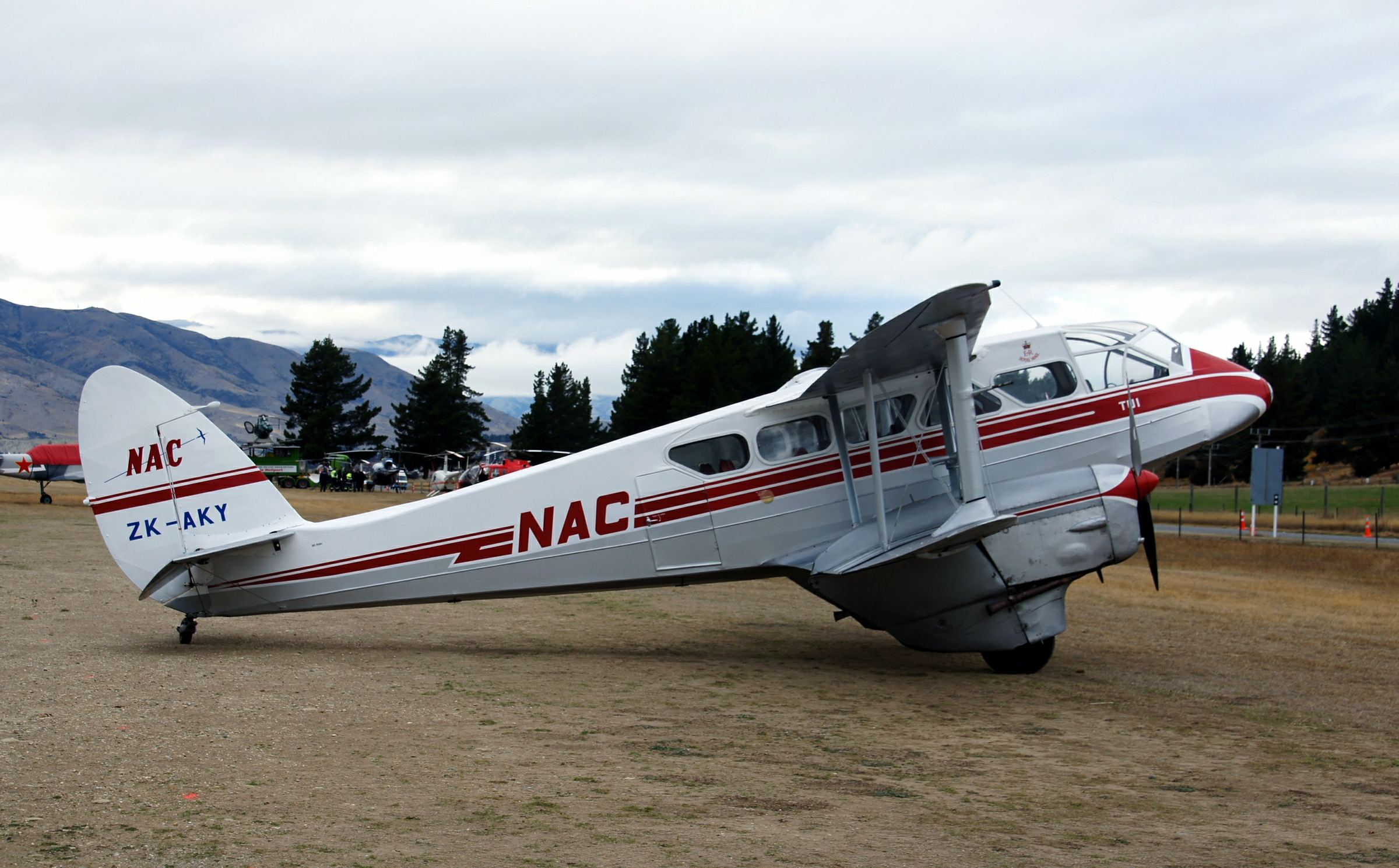 De Havilland DH89B Dominie Luggate New Zealand